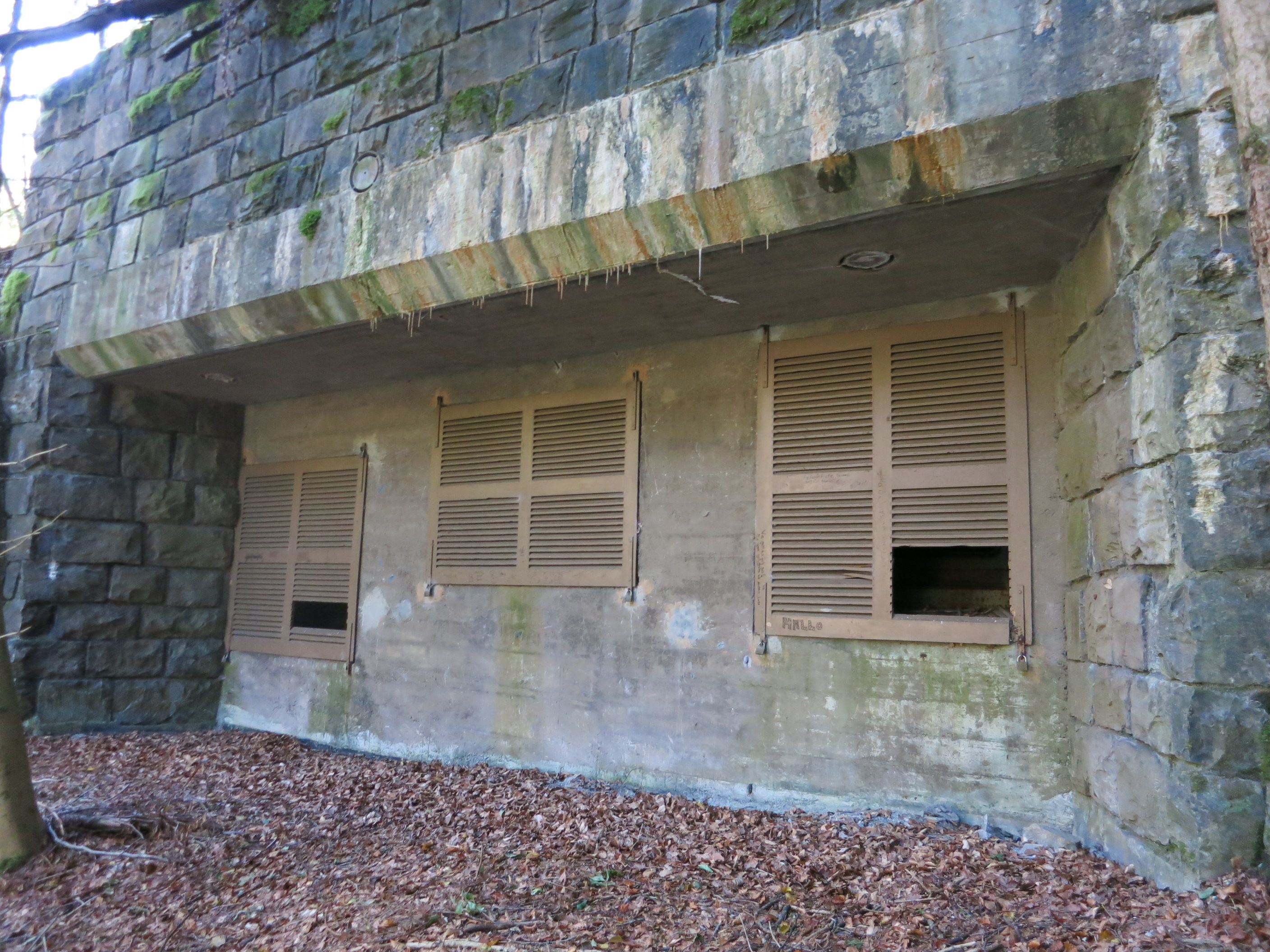 Sperrstelle Mülenen BE, Schweiz